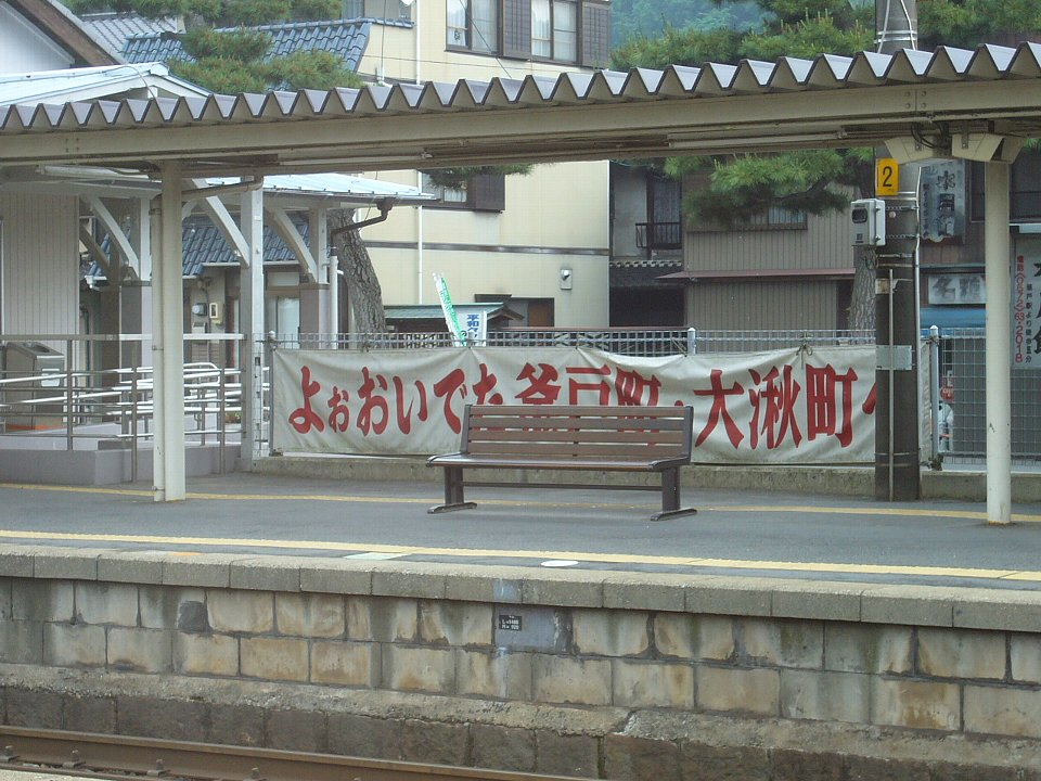 美濃弁の一例 釜戸駅にて